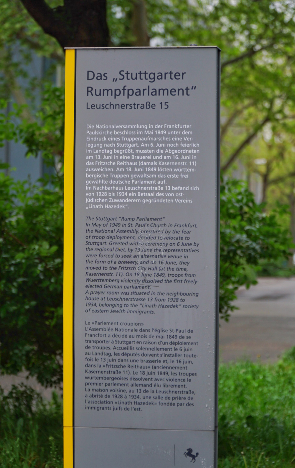 Es ist die Gedenktafel in der Leuschnerstraße in Stuttgart zu sehen.